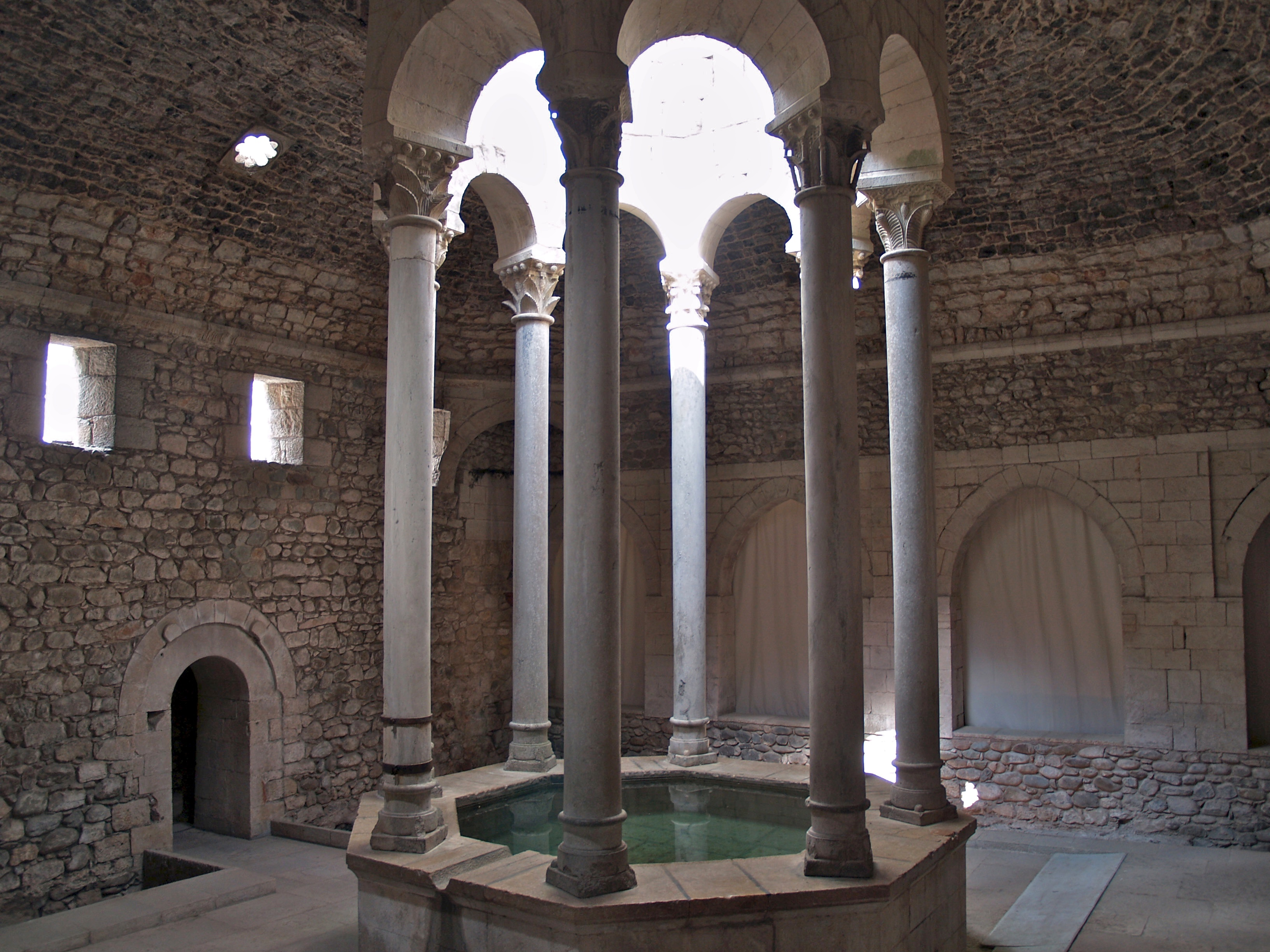 Girona - Banys Àrabs 1194